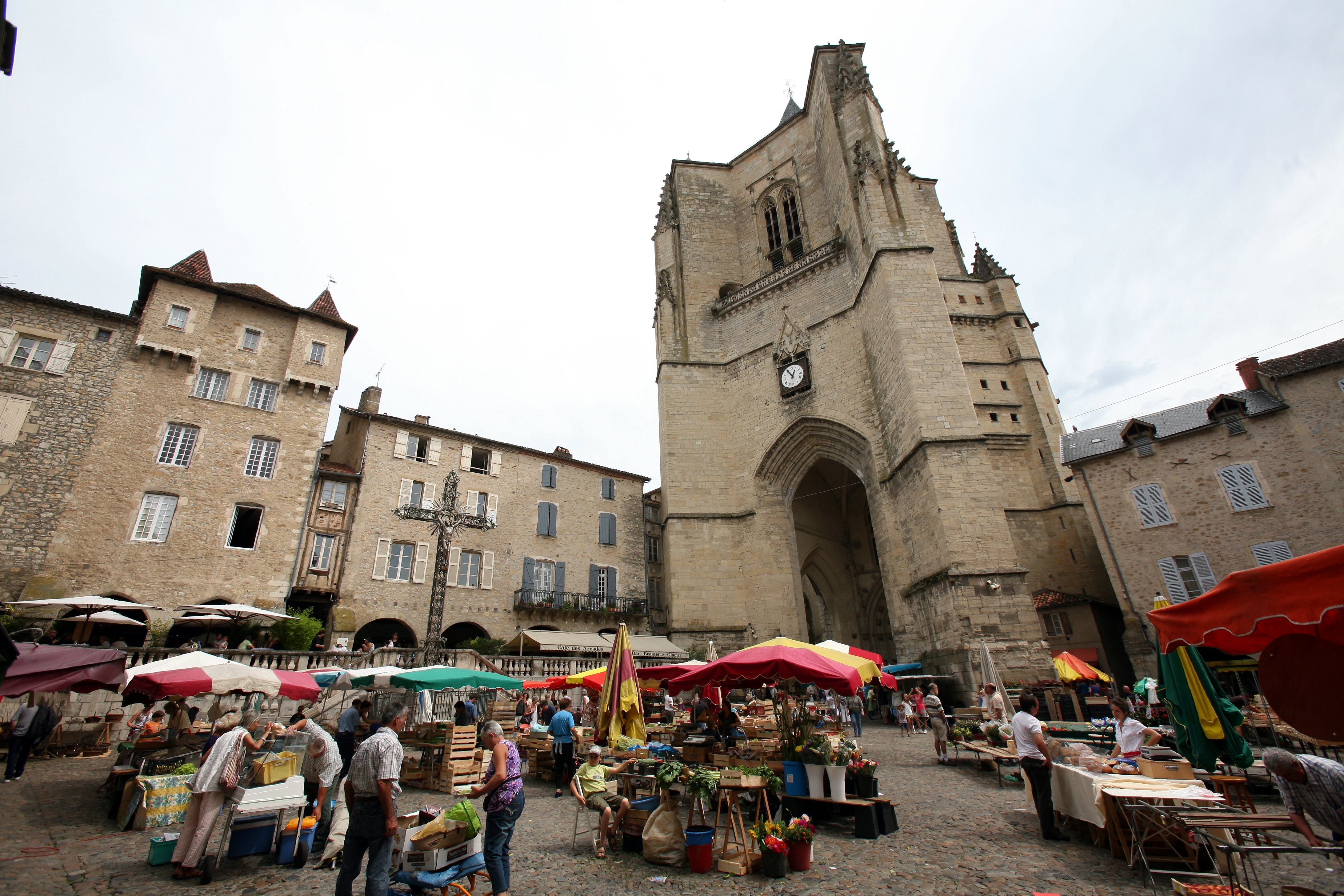 Le marché à Villefranche-de-Rouergue (Occitanie).